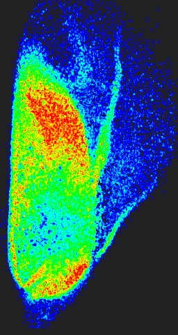 Imagen de la semilla de maiz procesada con el metodo de las diferencias generalizadas.